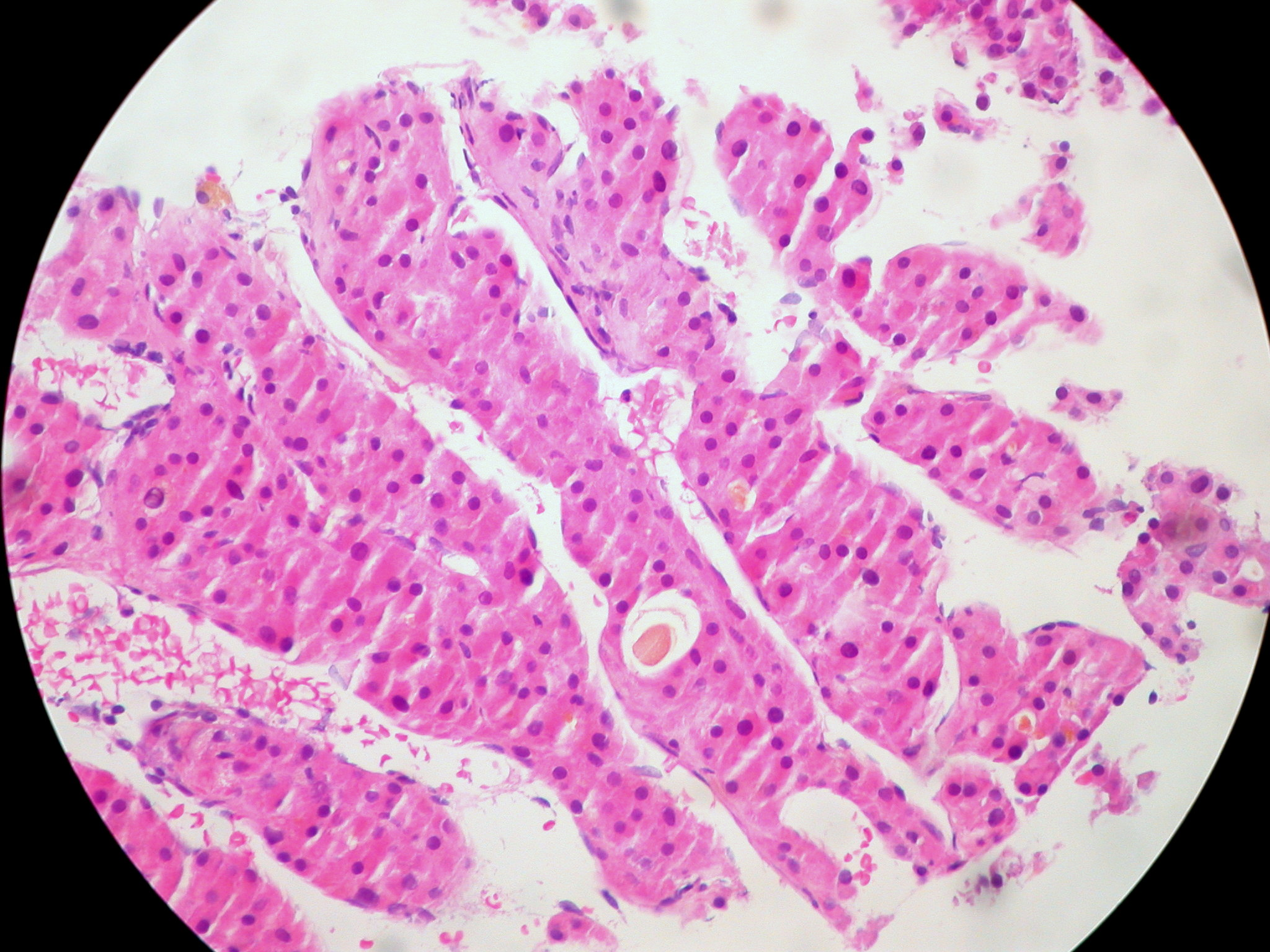 Hepatocellular carcinoma